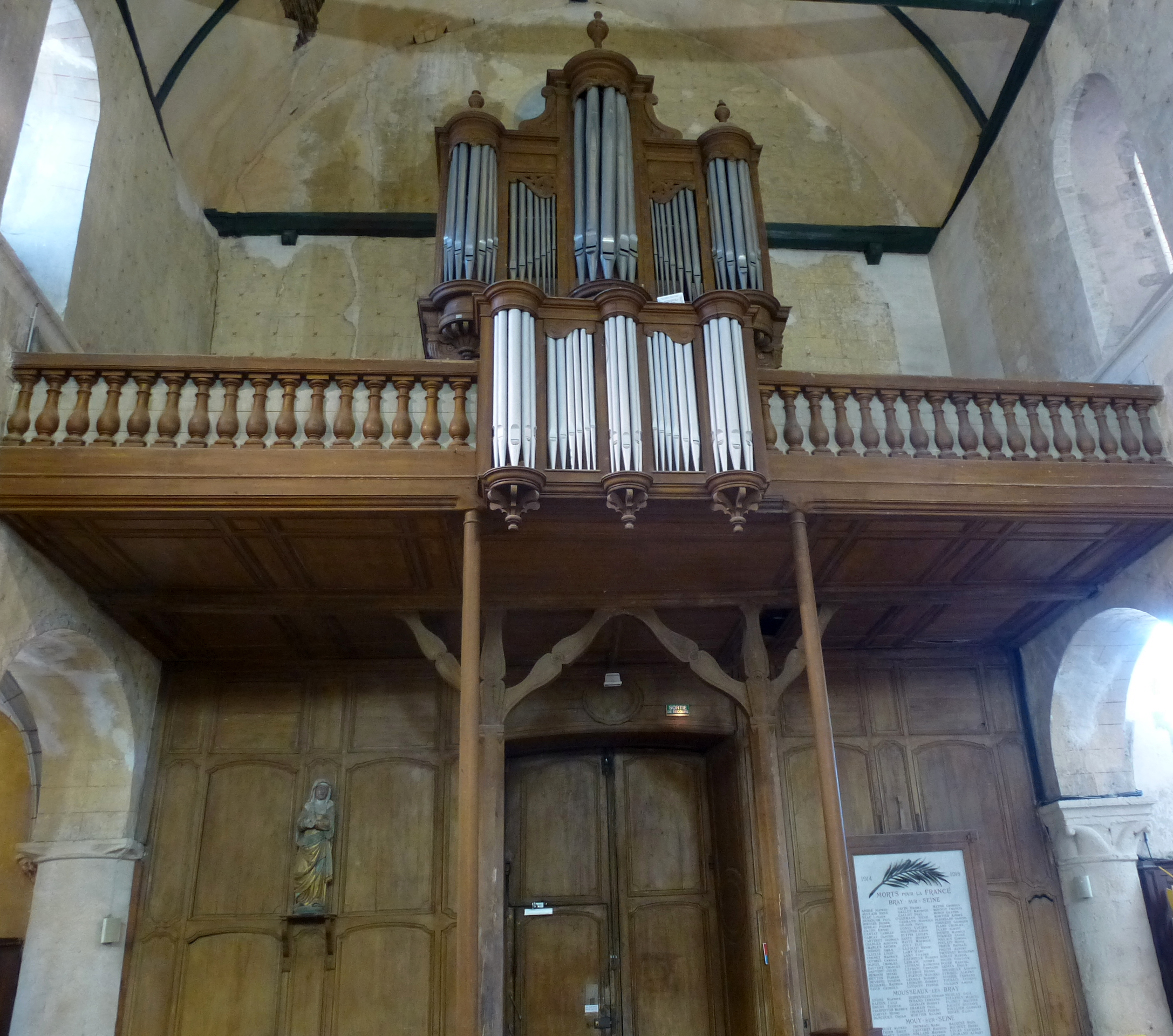 Orgue de l'église Sainte-Croix de Bray-sur-Seine. (département de la Seine-et-Marne, région Île-de-France).